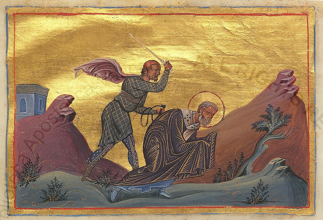 Убиение свт. Дионисия Великого. Миниатюра из Минологии Василия II. 976-1025 гг. (Vat. gr. 1613. P.86) // Pope Dionysius of Alexandria